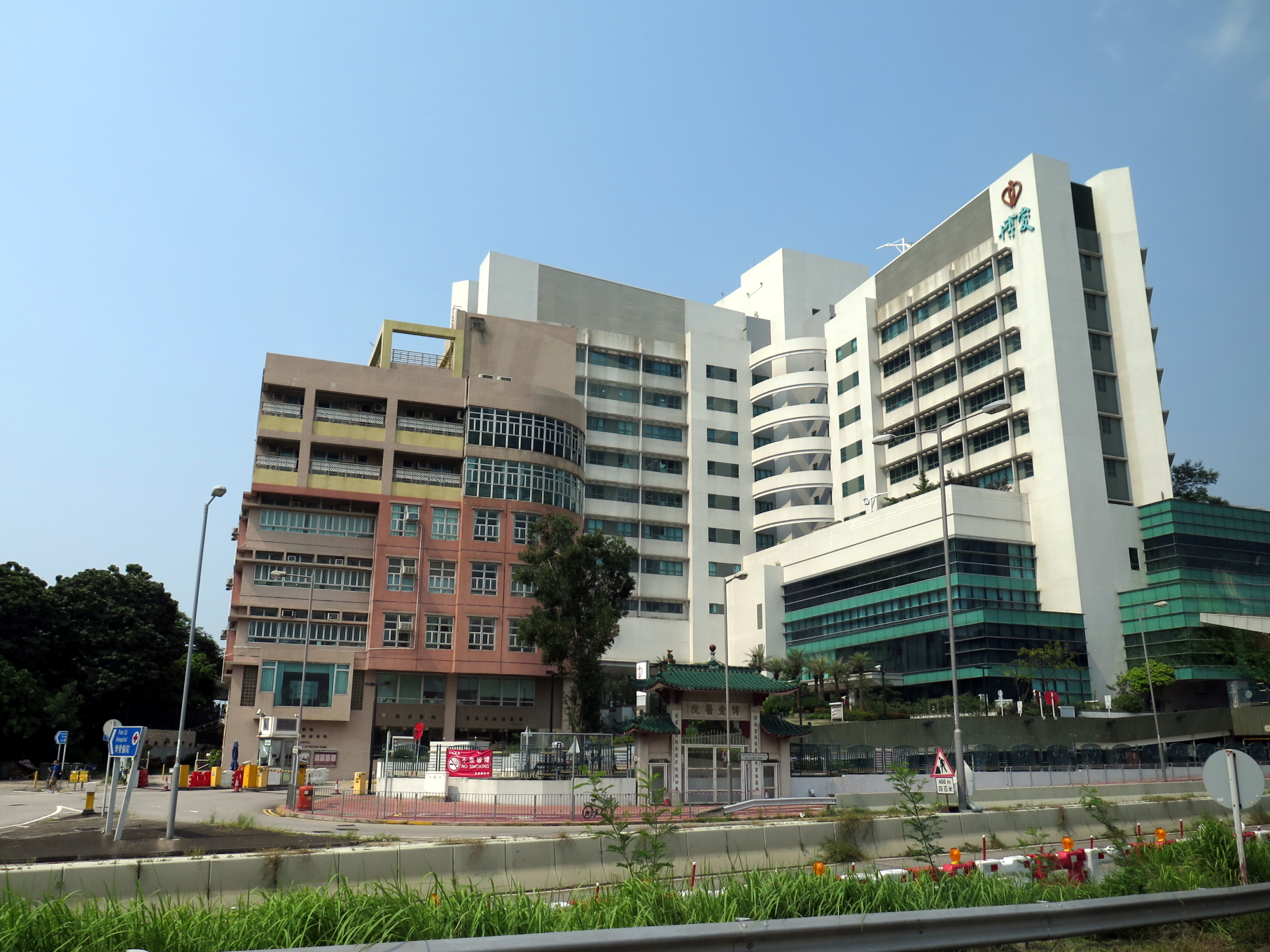 Pok Oi Hospital